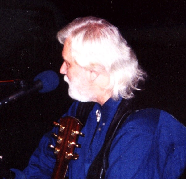 Karel Černoch na výroční akci ke 30. výročí založení oddílu Neskenon, Praha 1995